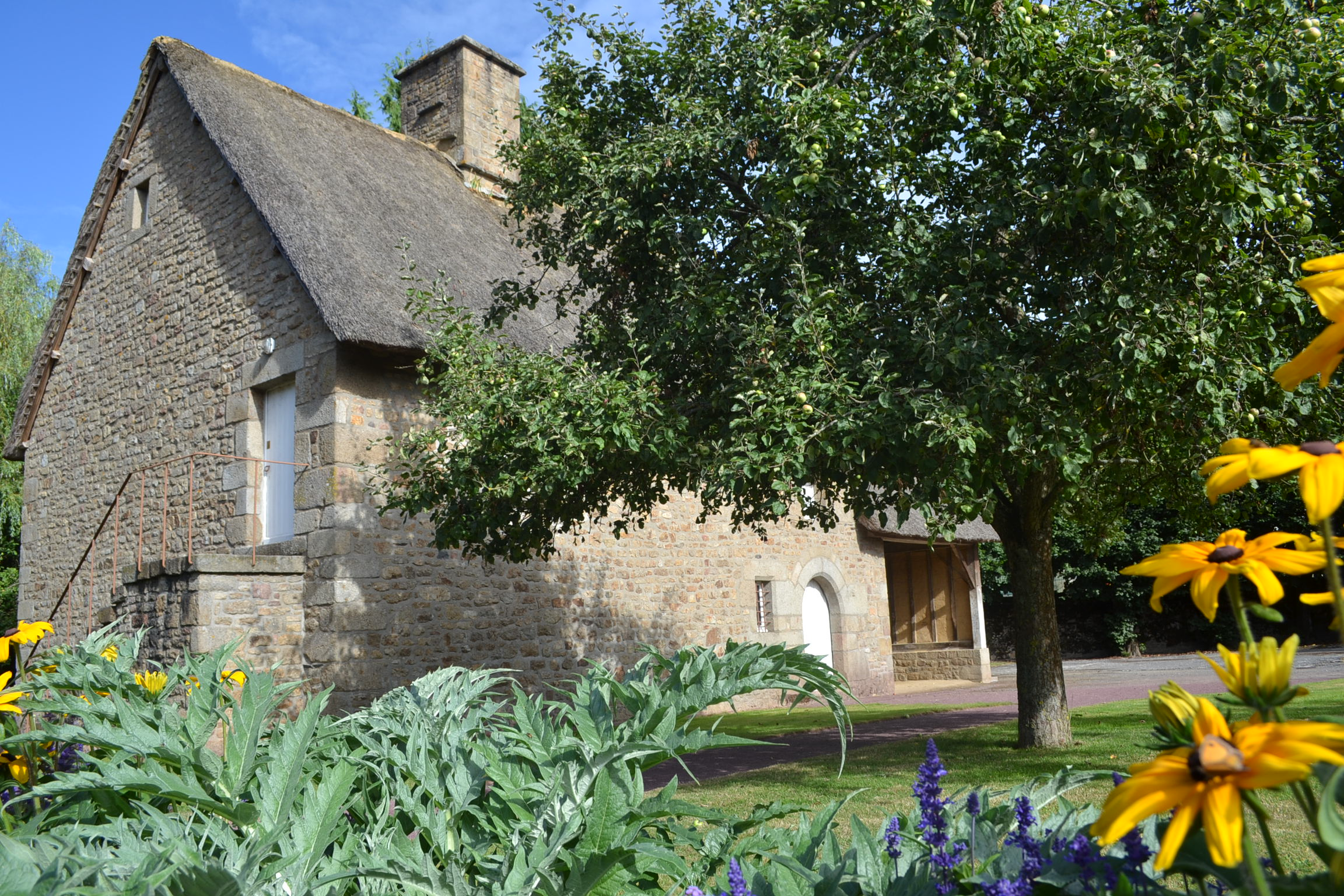 Chaumière du Musée municipal de Vire